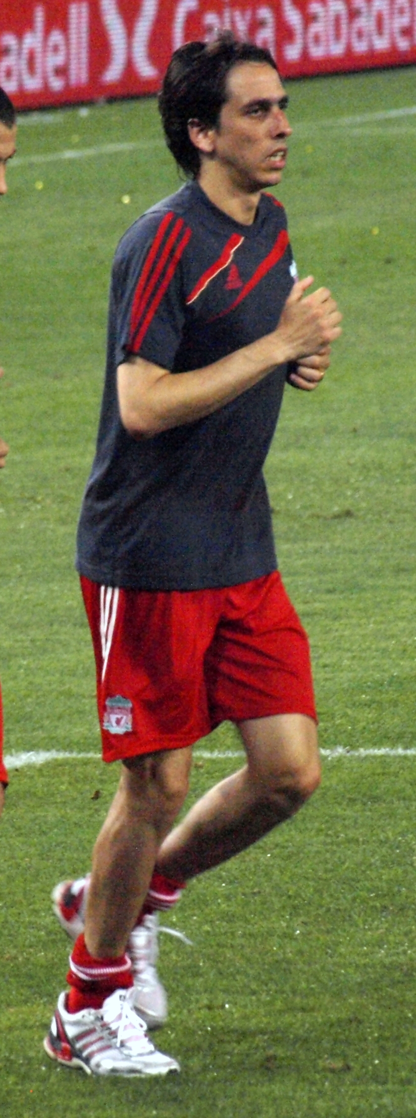 Yossi Benayoun con la camiseta del Liverpool en el partido de presentación del Estadio de Cornella-El Prat disputado ante el RCD Español de Barcelona